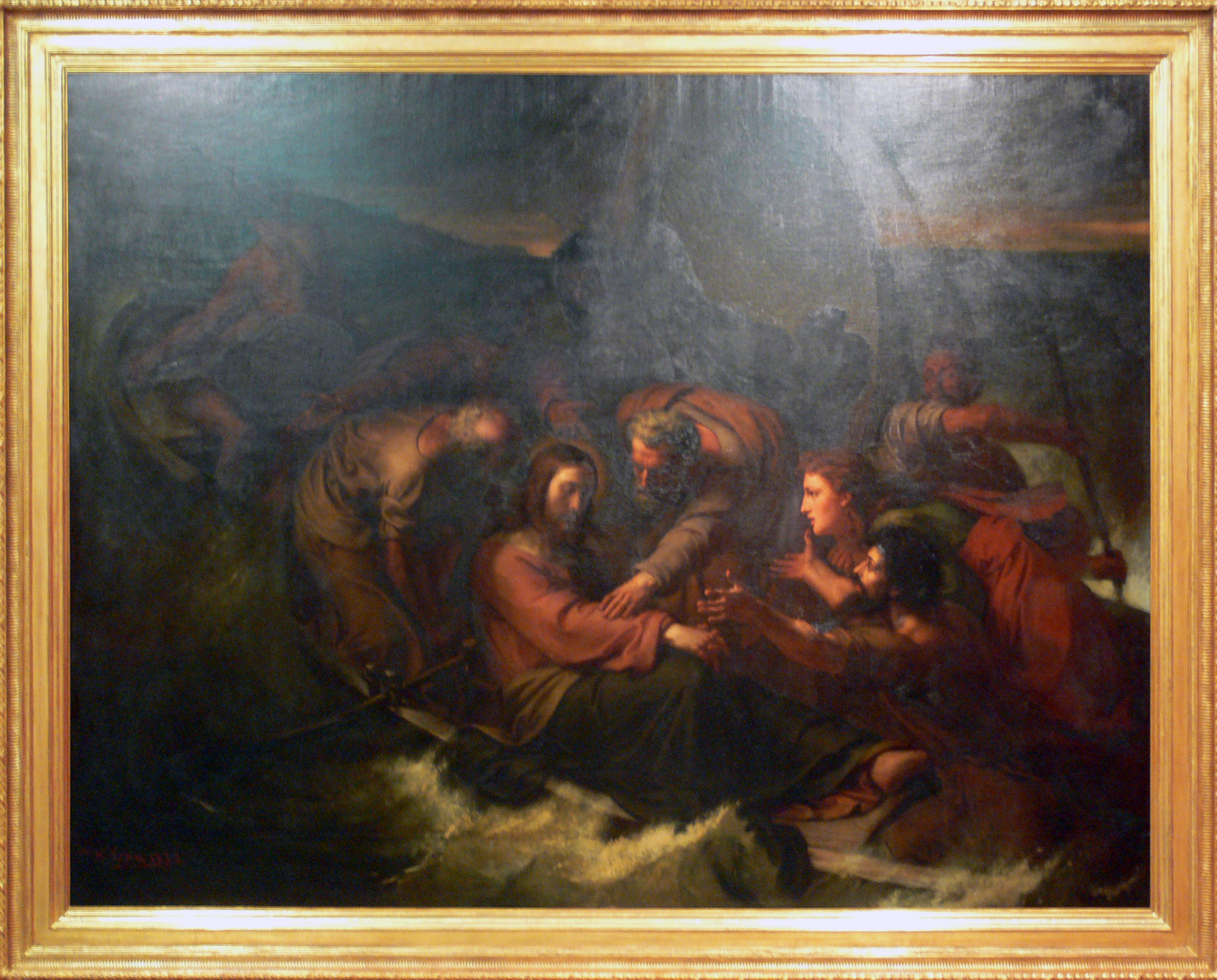 Jesus und die Jünger auf dem stürmischen Meer